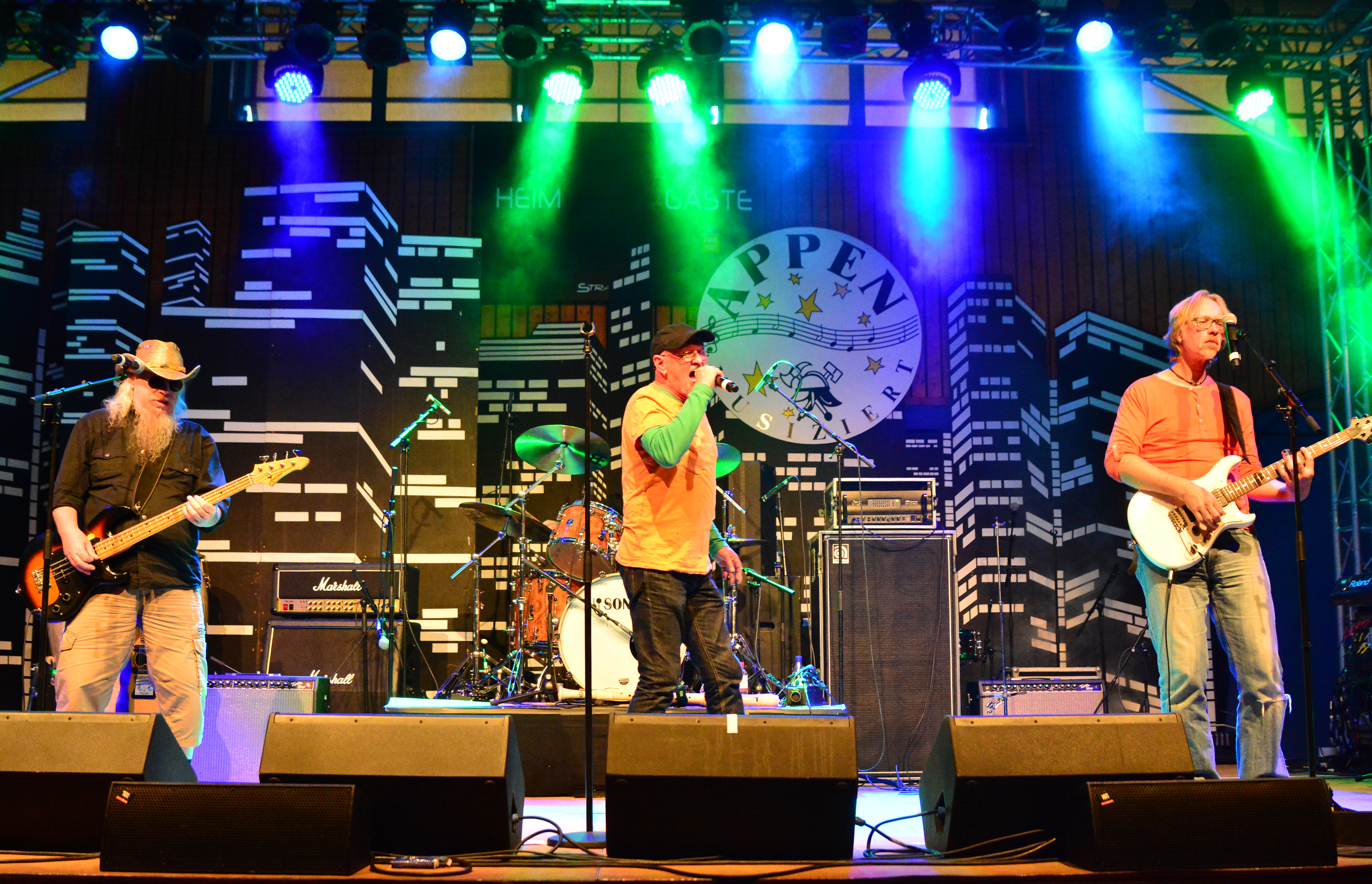 Torfrock bei Appen musiziert 2015